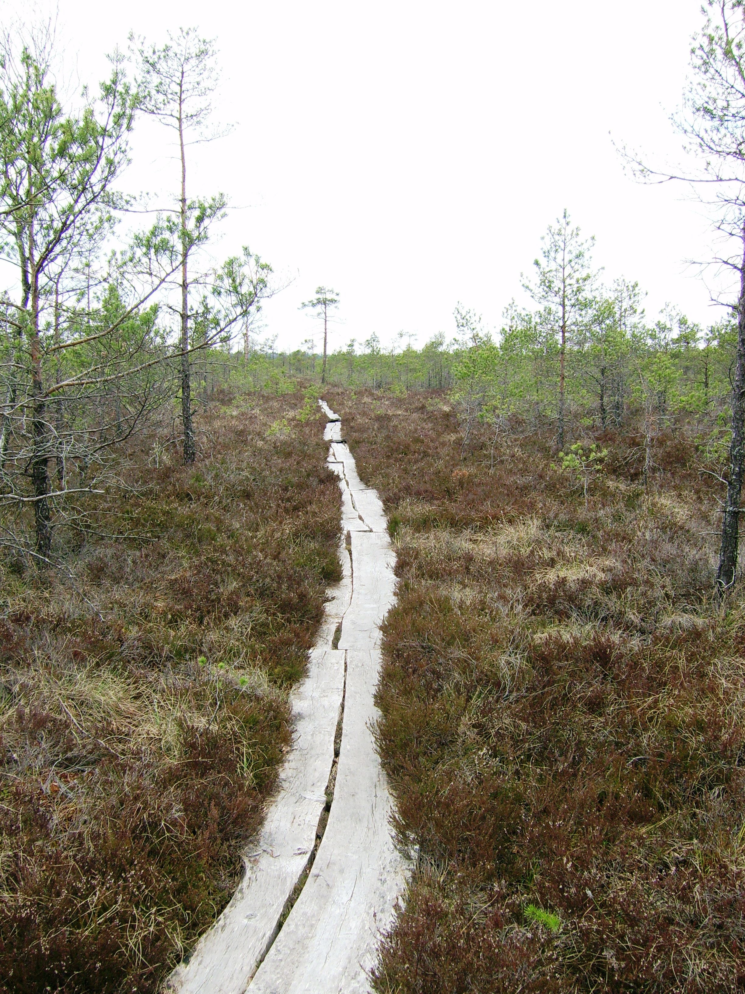 Plynosios pažintinis takas